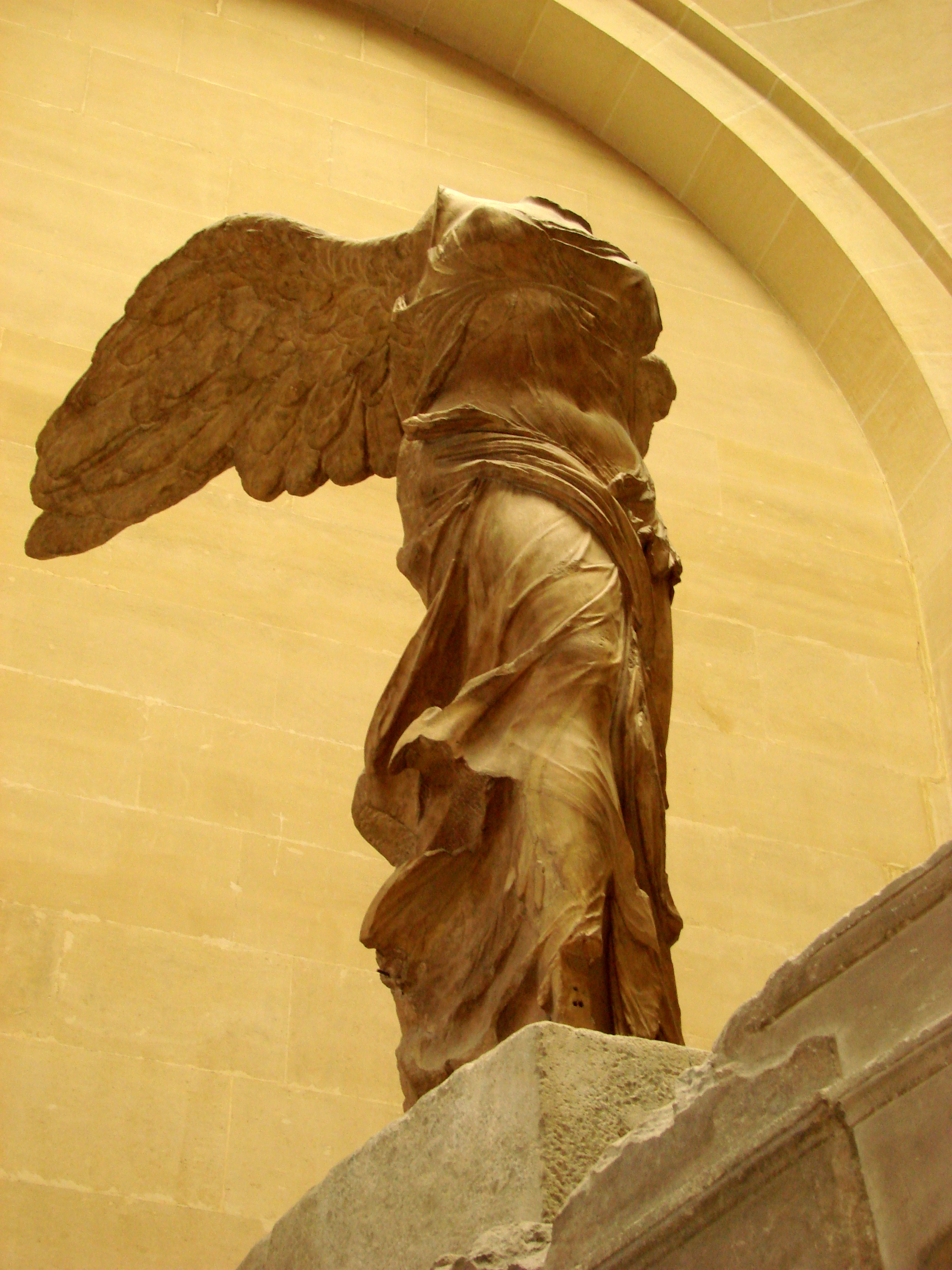 marmurowa rzeźba znajdująca się w Luwr